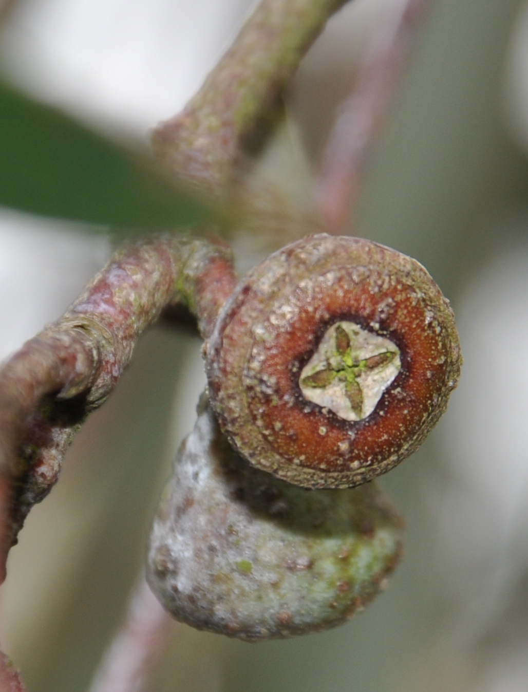 Fruit d'Eucalyptus coccifera (Jardin exotique & botanique, Roscoff, France)